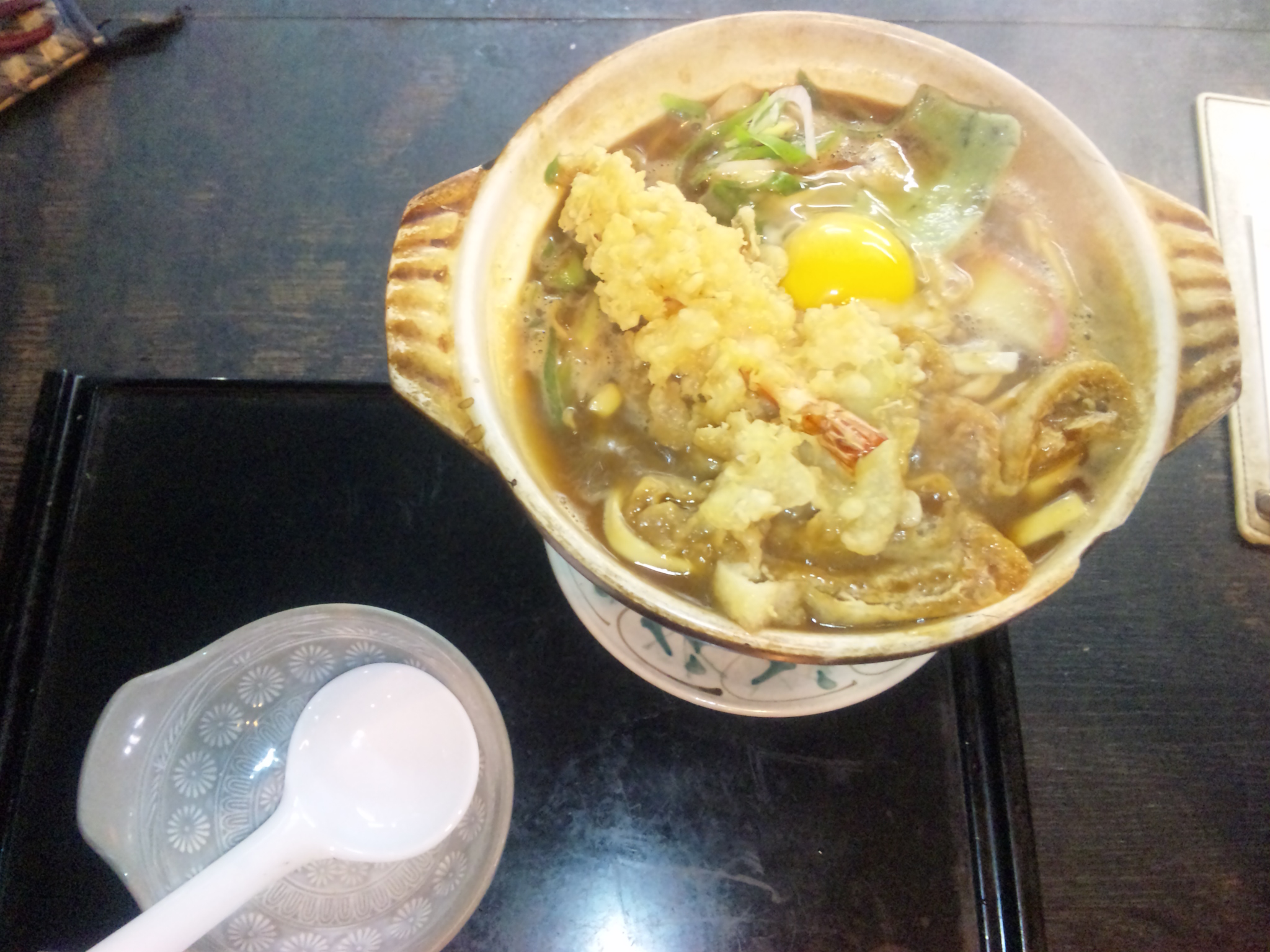 きしめん処「沙久良」の名古屋名物味噌煮込みきしめん